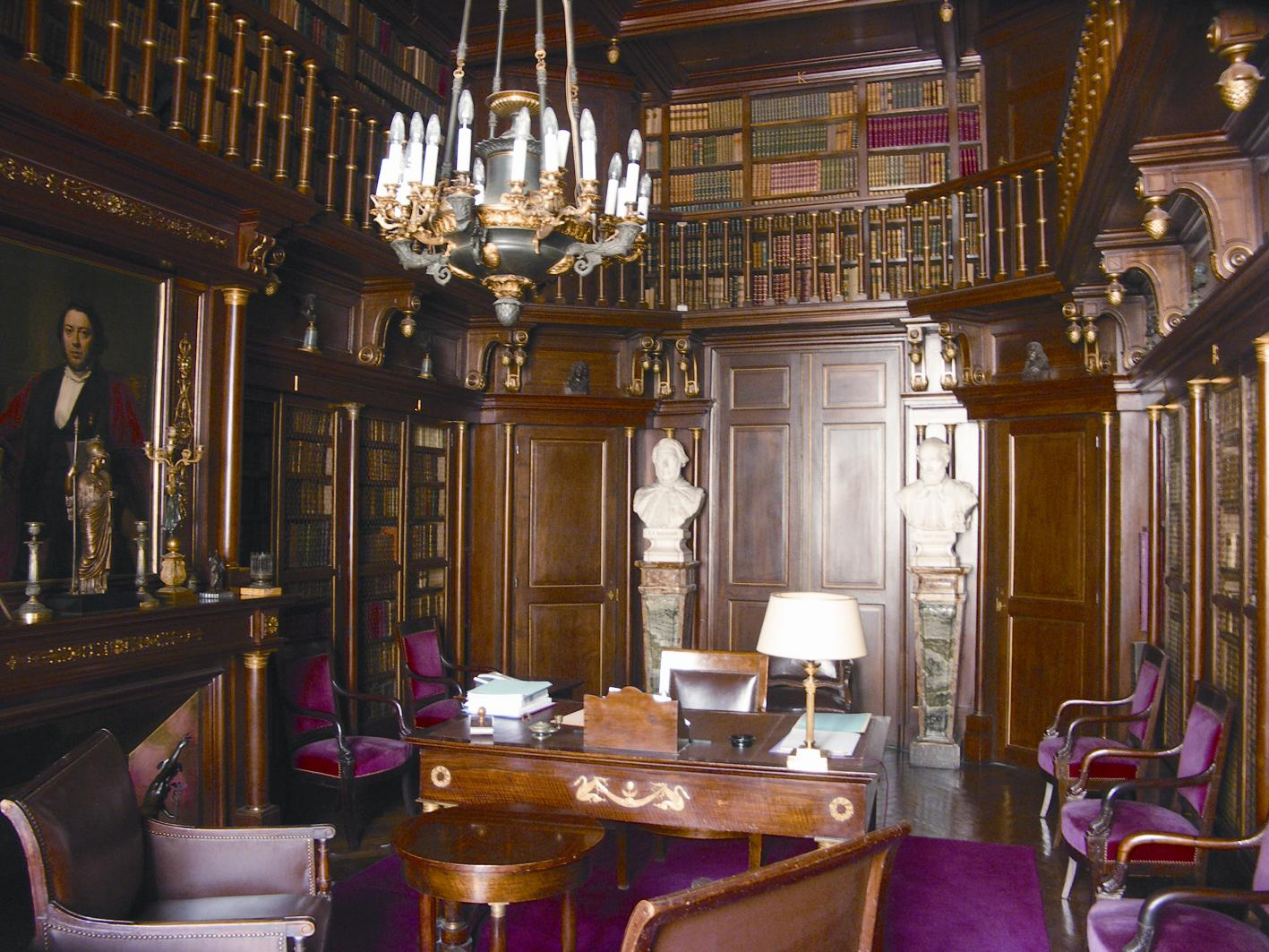 Le bureau du doyen de la Faculté de Médecine de Montpellier Photographie personnelle